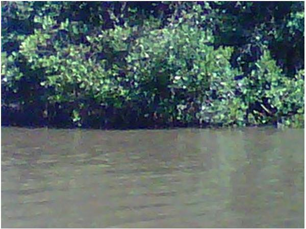 Rio Higuamo